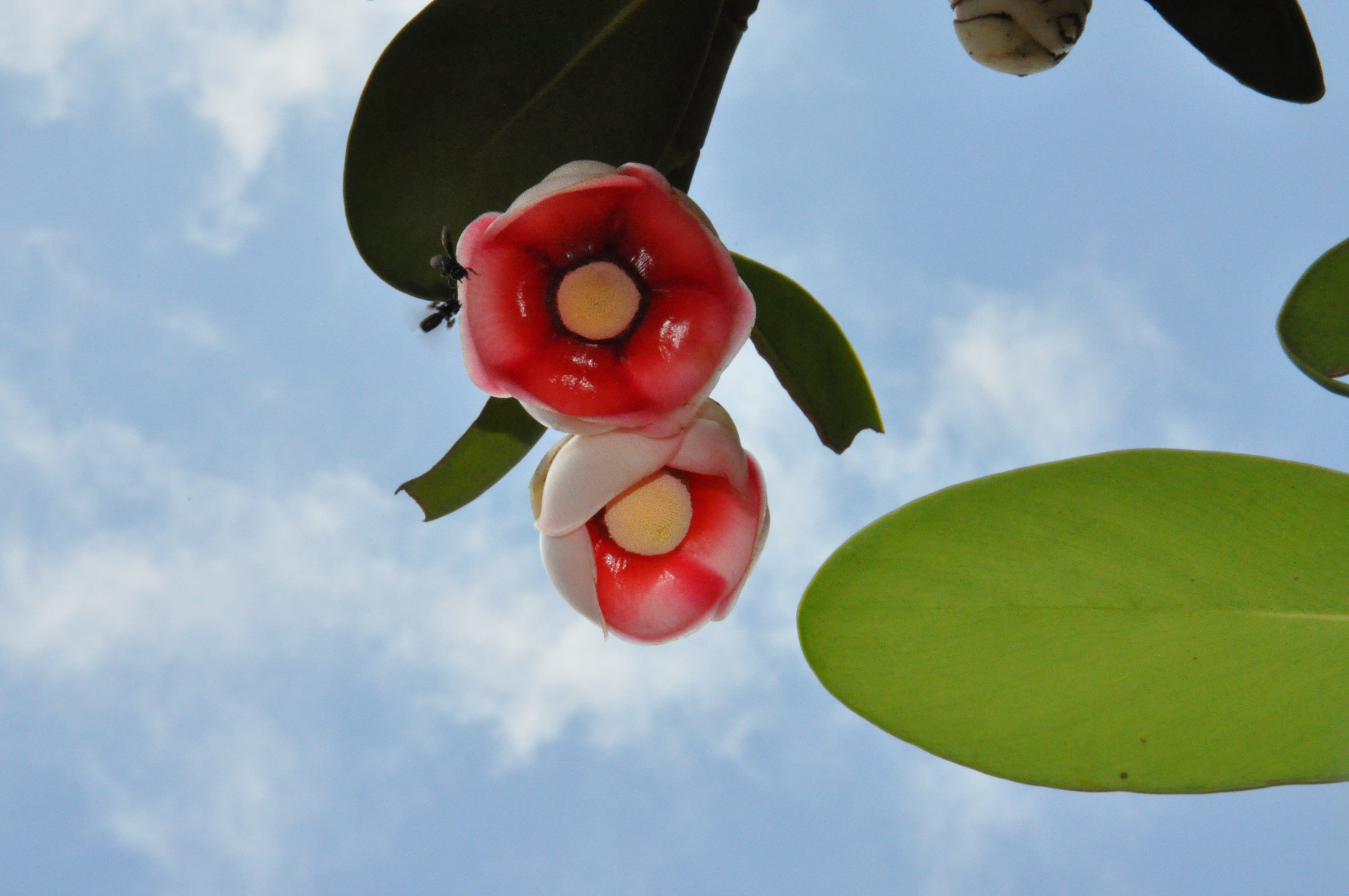 Nikon D90 - Lente 18-105mm